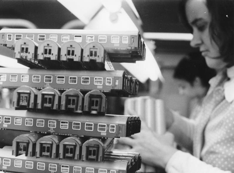 TT-Eisenbahnen der Firma Zeuke & Wegwerth KG ADN-ZB/Deutsche Demokratische Republik. Groß ist das Sortiment der TT-Modell-Eisenbahnen im Produktionsprogramm der Firma Zeuke & Wegwerth. Hier stellen fleißige Hände eine Kollektion von Schnellzugwagen 1. und 2. Klasse zusammen, damit sie noch rechtzeitig auf die Gabentische zum Weihnachtsfest gelangen. K 1126/328 N Information added by Wikimedia users.